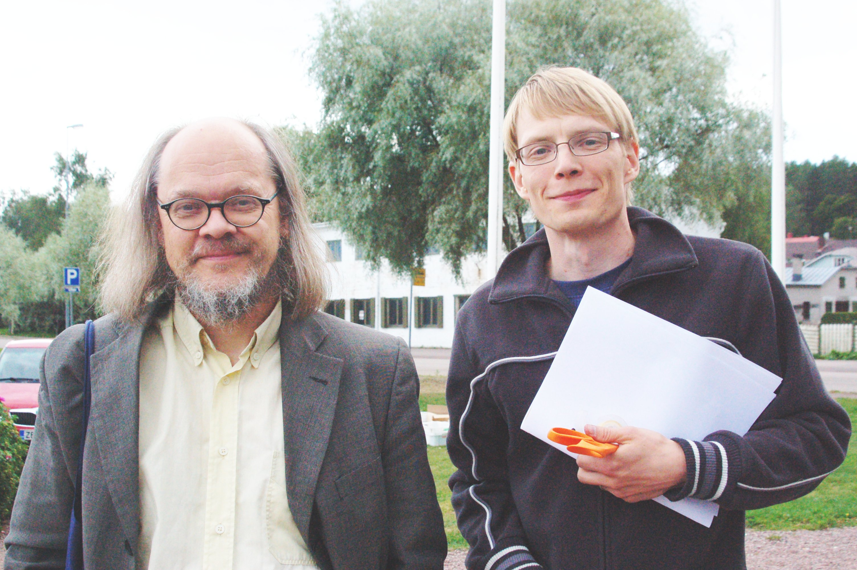 Ajan filosofia -kirjan kirjoittanut Eero Ojanen ja pääsihteeri Virtala. Kuva: Sally Armbrecht.